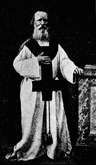 "Vintras" (Eugène, dit Pierre-Michel).